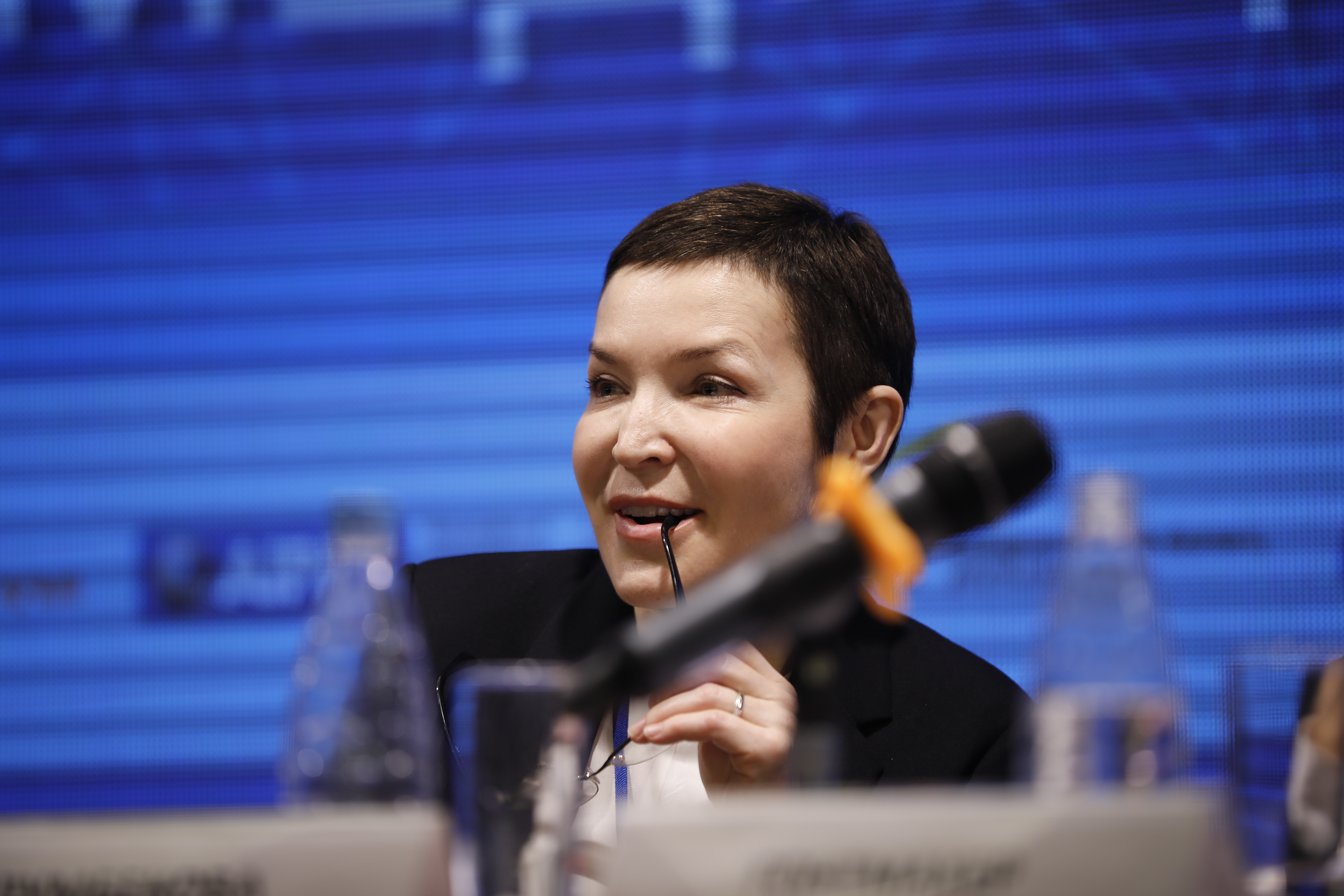 Улумбекова Гузель Эрнстовна на конгрессе "Оргздрав. Эффективное управление медицинской организацией"